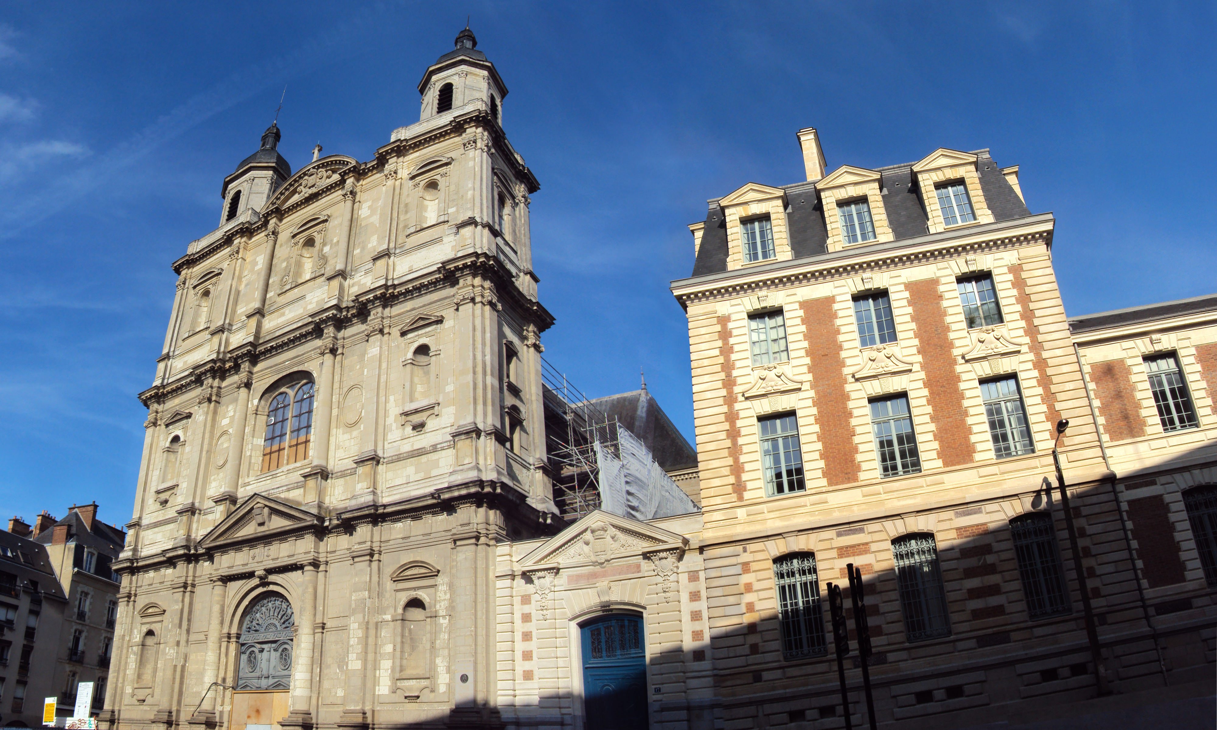 Toussaints church in Rennes - Britanny - 2014